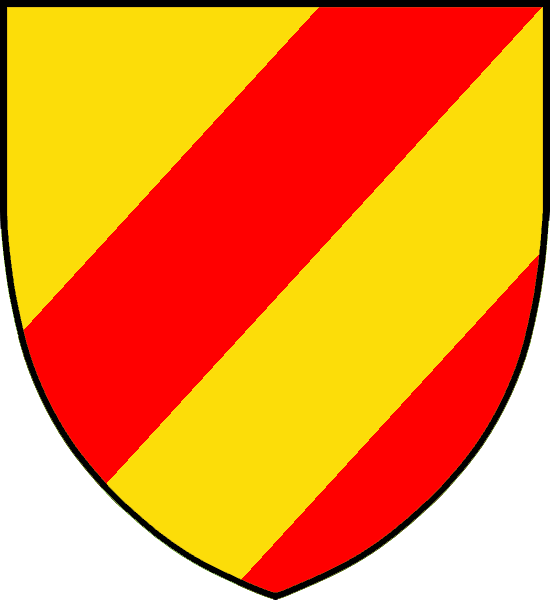 Vapensköld för Greger Magnusson (Bjälboättens oäkta gren)